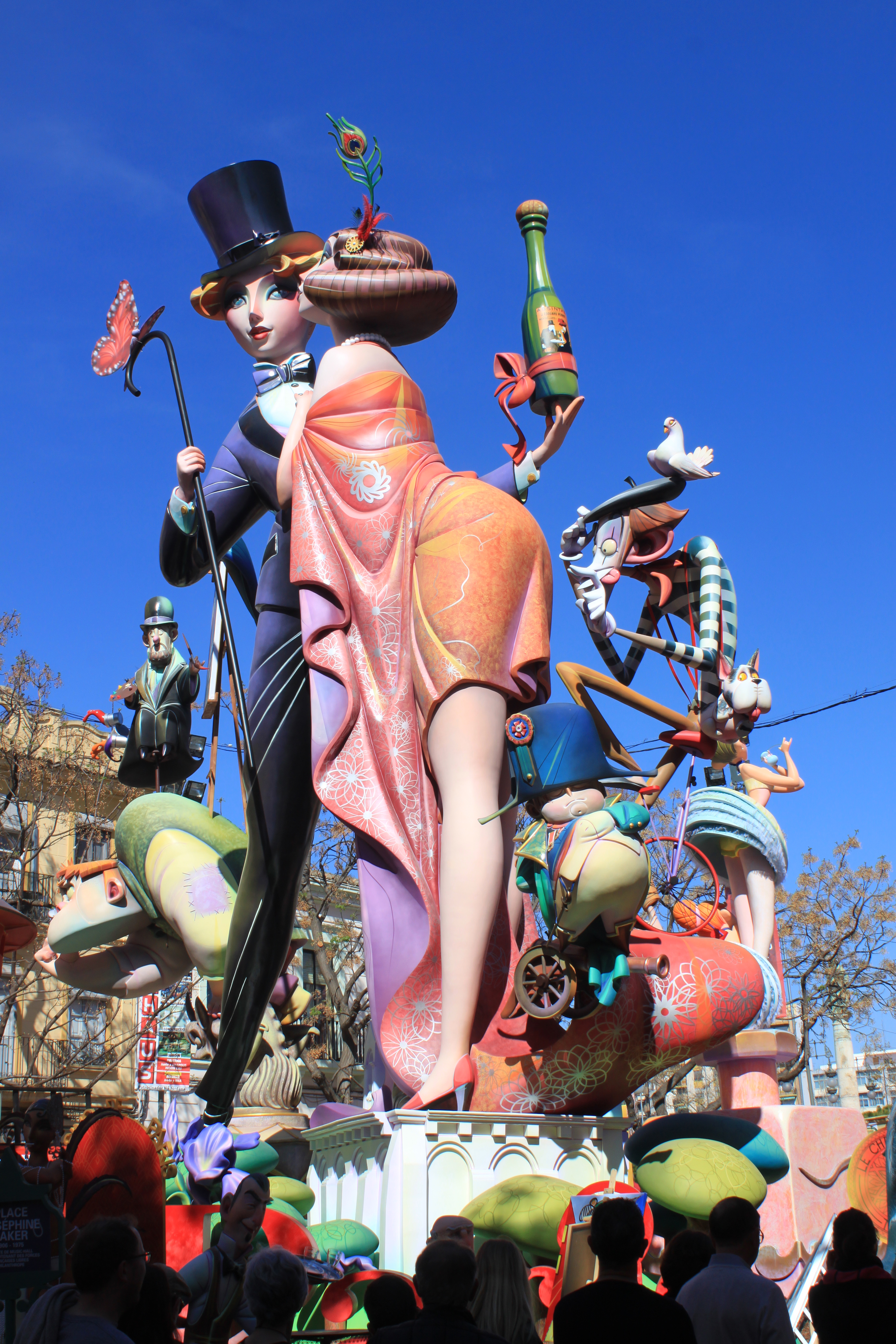 Falla Na Jordana de Valencia de 2019. Valencia, Comunidad Valenciana, España.